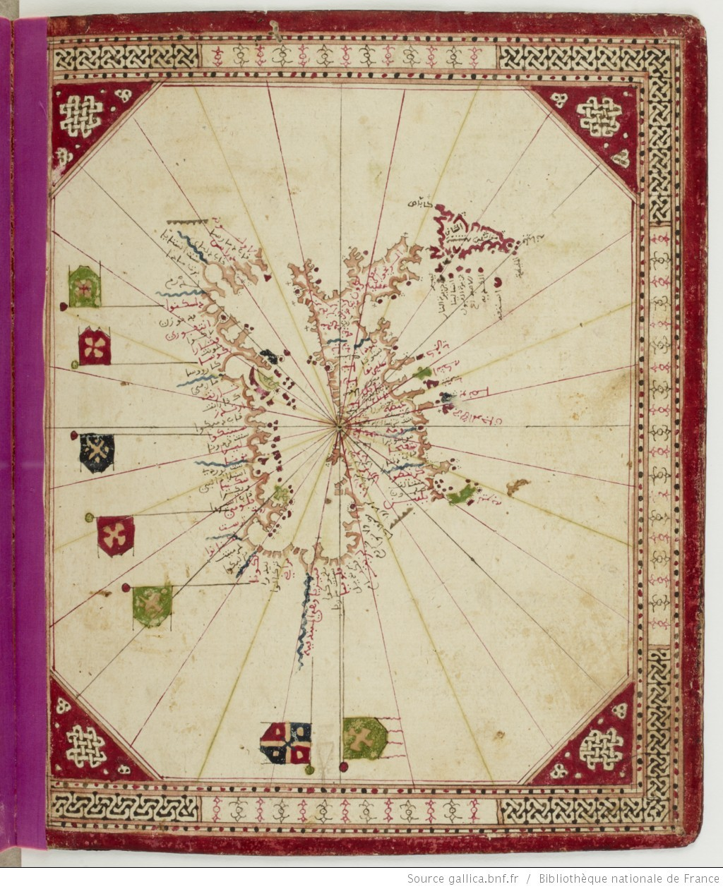 كتاب الطبلة